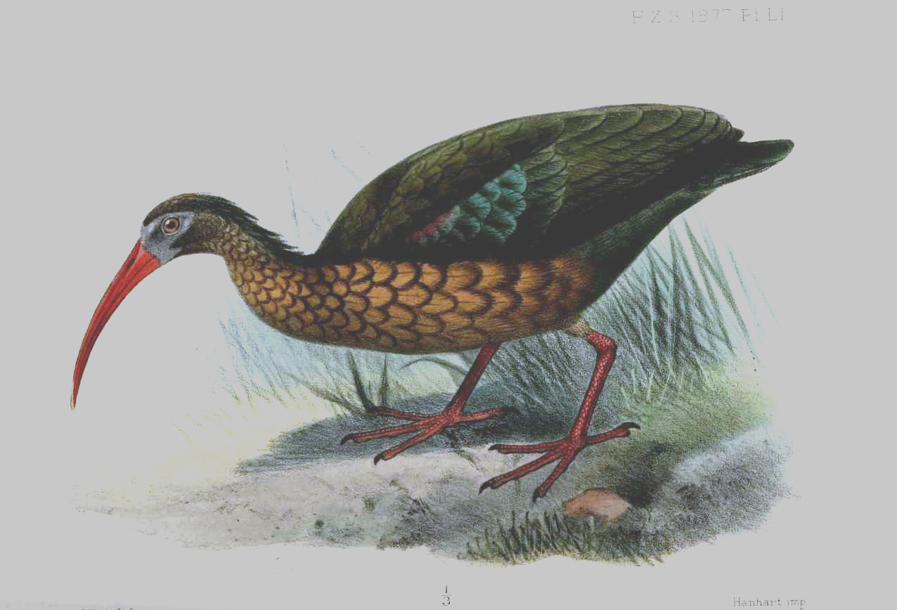 Lampribis olivacea = Ibis olivacea = Bostrychia olivacea